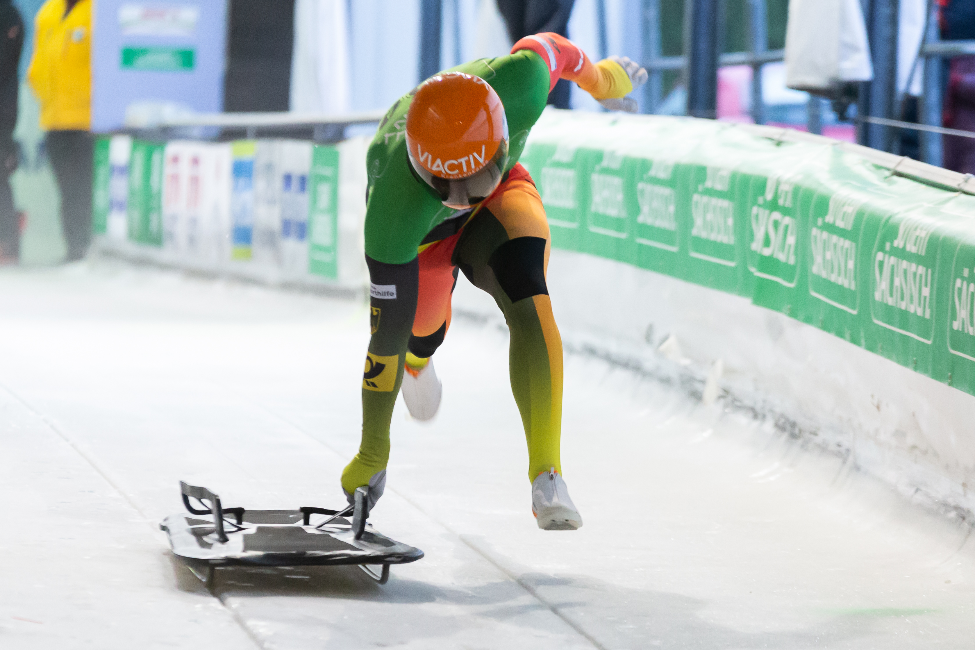 Deutsche Meisterschaften Skeleton; Felix Keisinger (WSV Königssee) beim Start